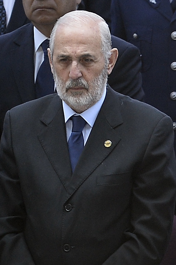 Gobierno de Chile